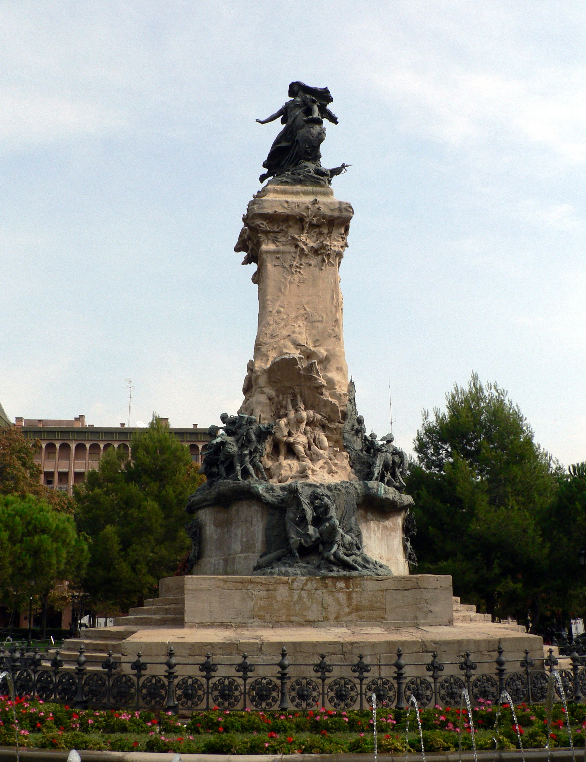 Monumento a los Sitios (Plaza de los Sitios, Zaragoza, España).